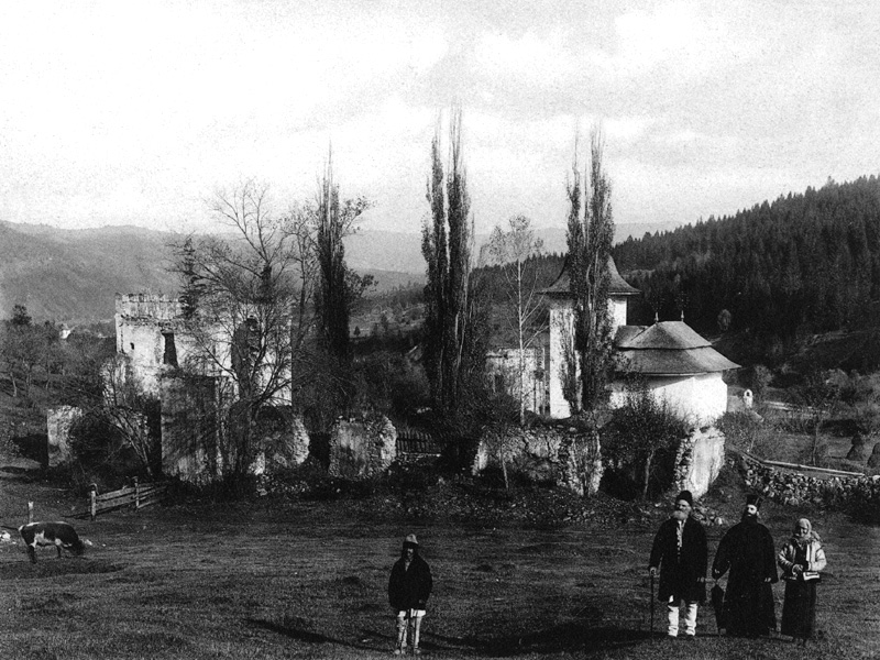 Biserica Hangu, Neamţ